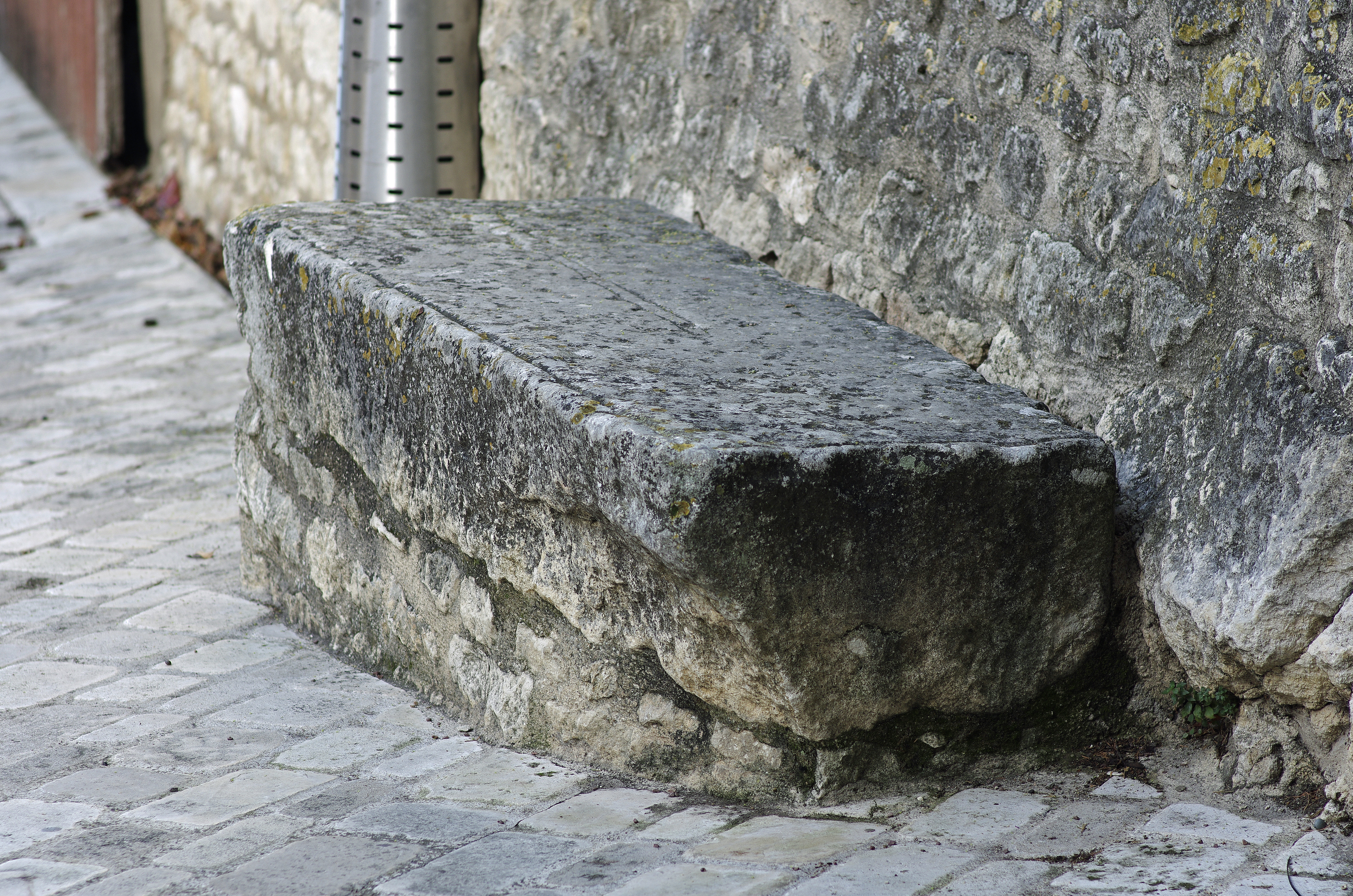 Chauvigny (Vienne) Église Saint-Pierre. Pierre des morts devant la façade occidentale. Cette table en pierre brute ou presque, permettait de poser le mort en attente du prêtre.